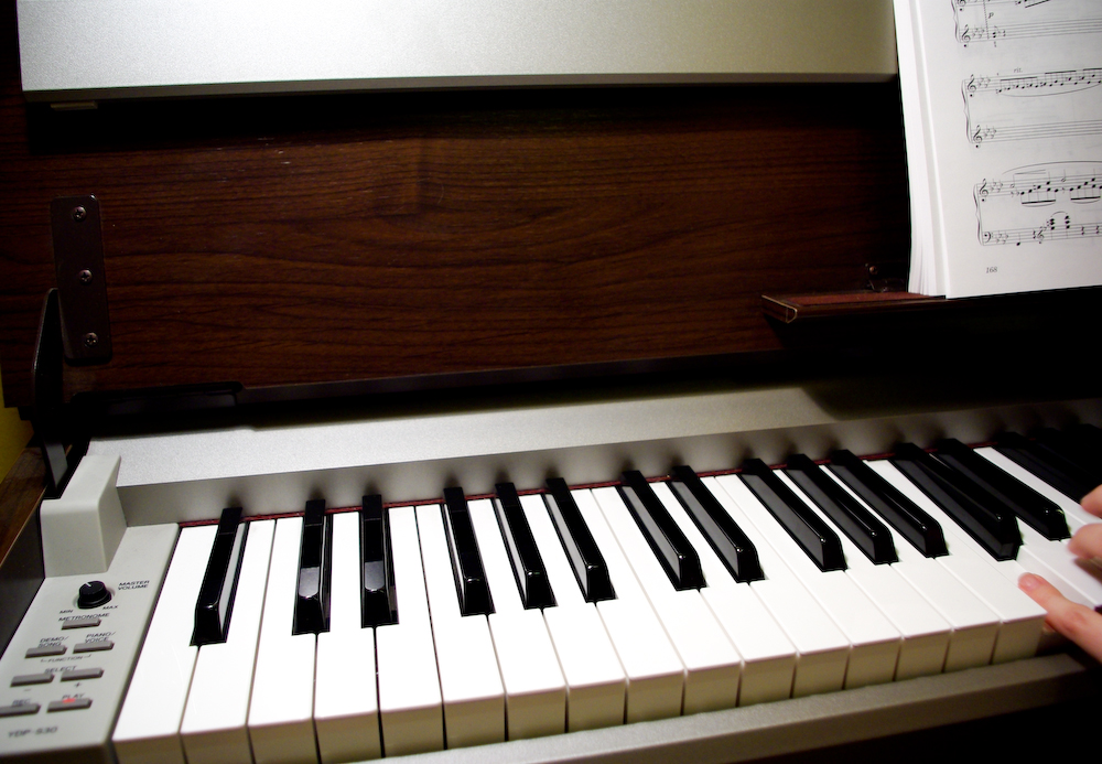 YAMAHA YDP-S30 Digital Piano